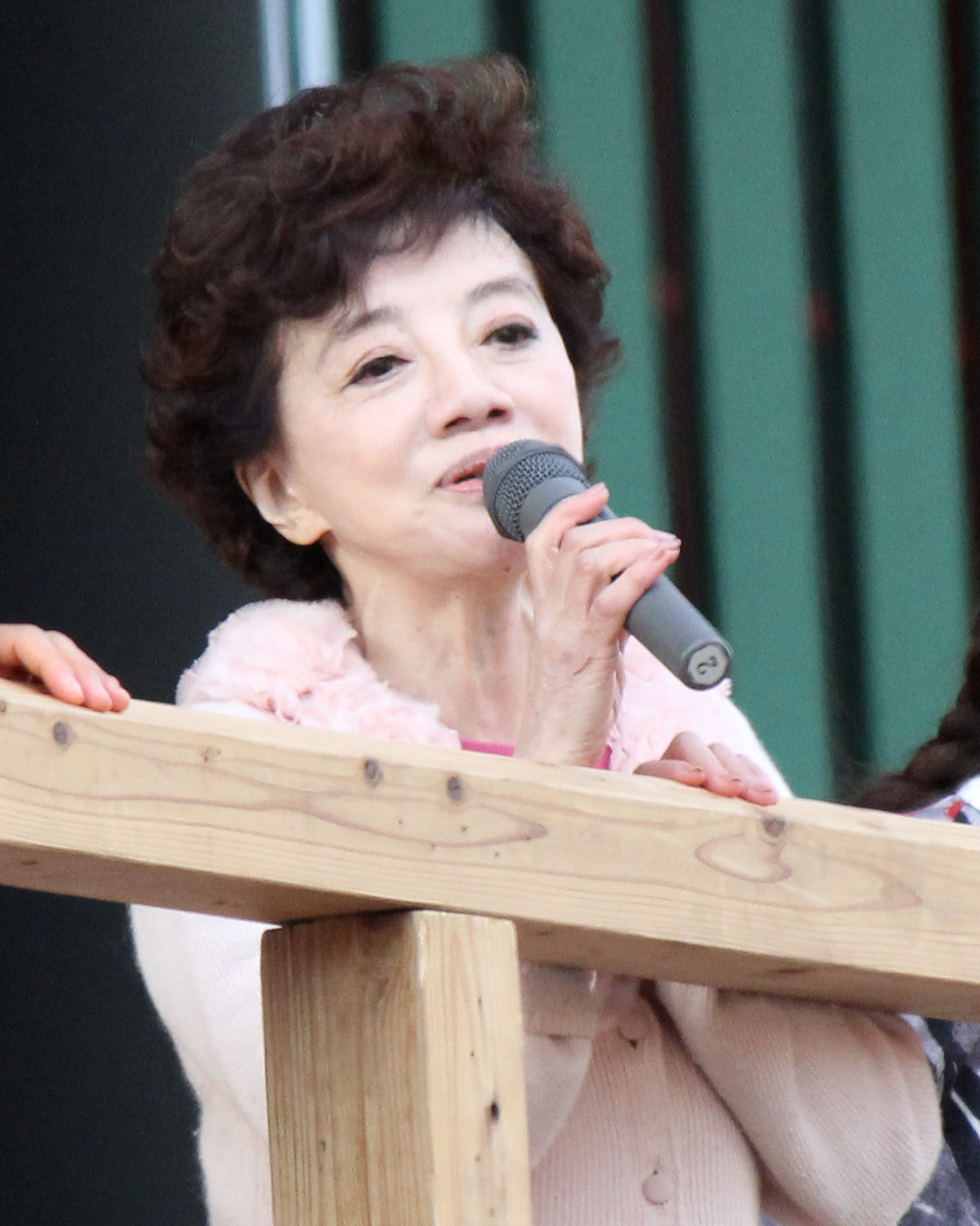 松島トモ子（2016年2月3日・浅草観音文化芸能人節分会にて）